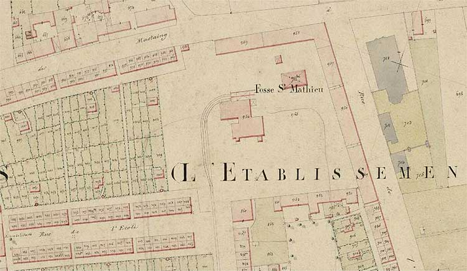 La fosse Saint-Mathieu ou n° 1 de la Compagnie des mines de Douchy était un charbonnage constitué d'un seul puits situé à Lourches, Nord, Nord-Pas-de-Calais, France.